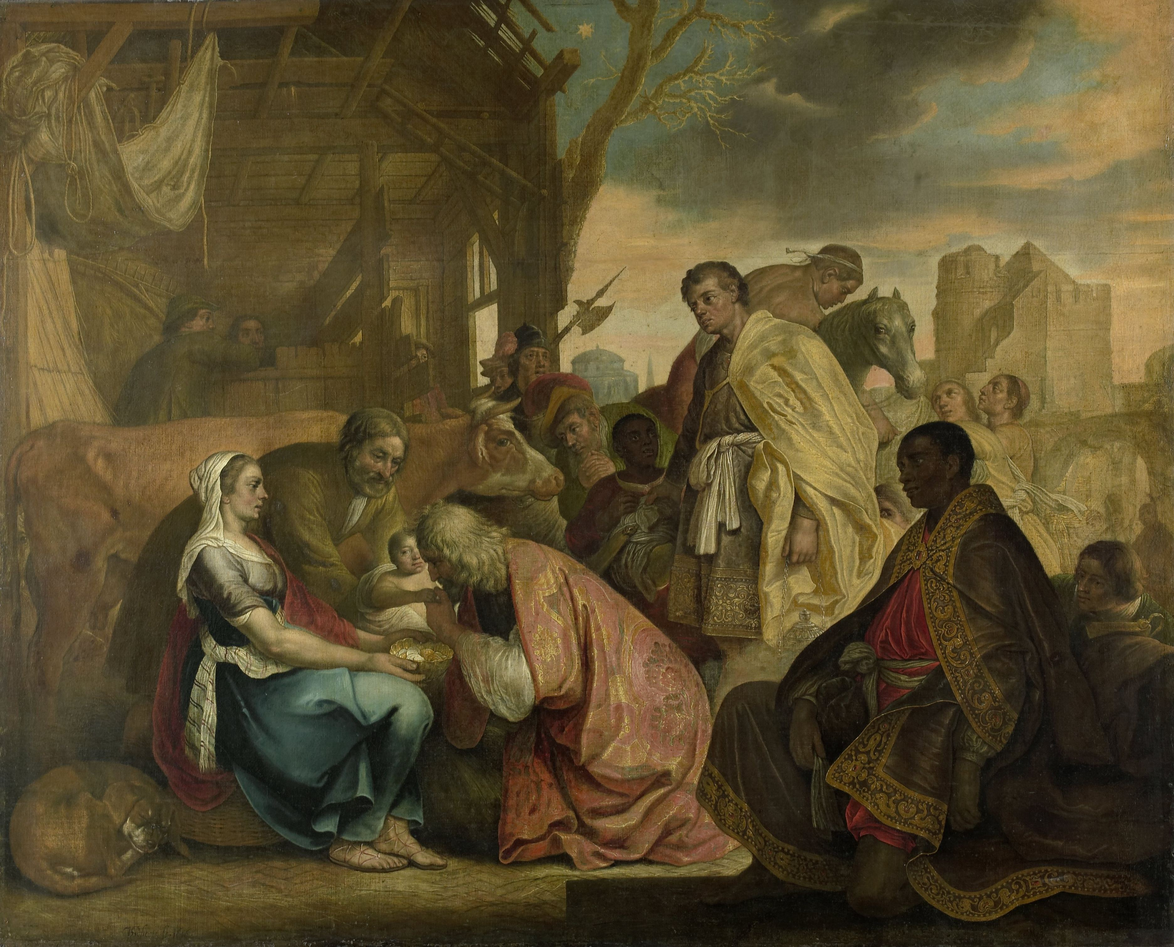 De aanbidding der koningen. Links de heilige familie in de stal, rechts de koningen met hun gevolg. Jozef houdt het Christuskind vast terwijl de eerste koning de hand van het kind kust, Maria heeft het geschenk in ontvangst genomen. Achter Maria een slapende hond en een os.